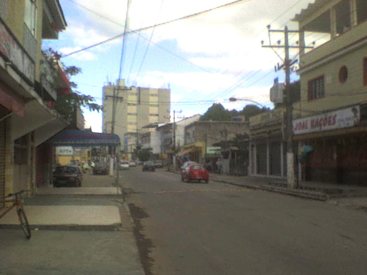 A Estrada Retiro da Imprensa. Bairro Piam, Belford Roxo - Brasil